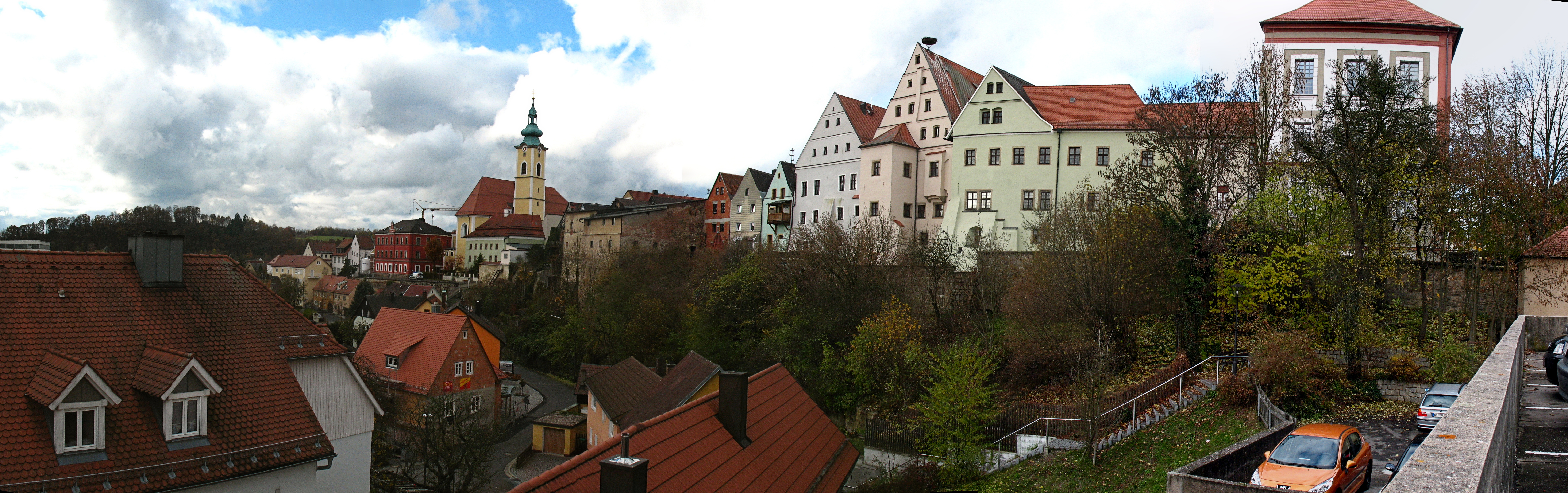 Deutschland, Bayern, Regierungsbezirk Oberpfalz, Landkreis Neustadt an der Waldnaab, Neustadt an der Waldnaab, Stadtpanorama